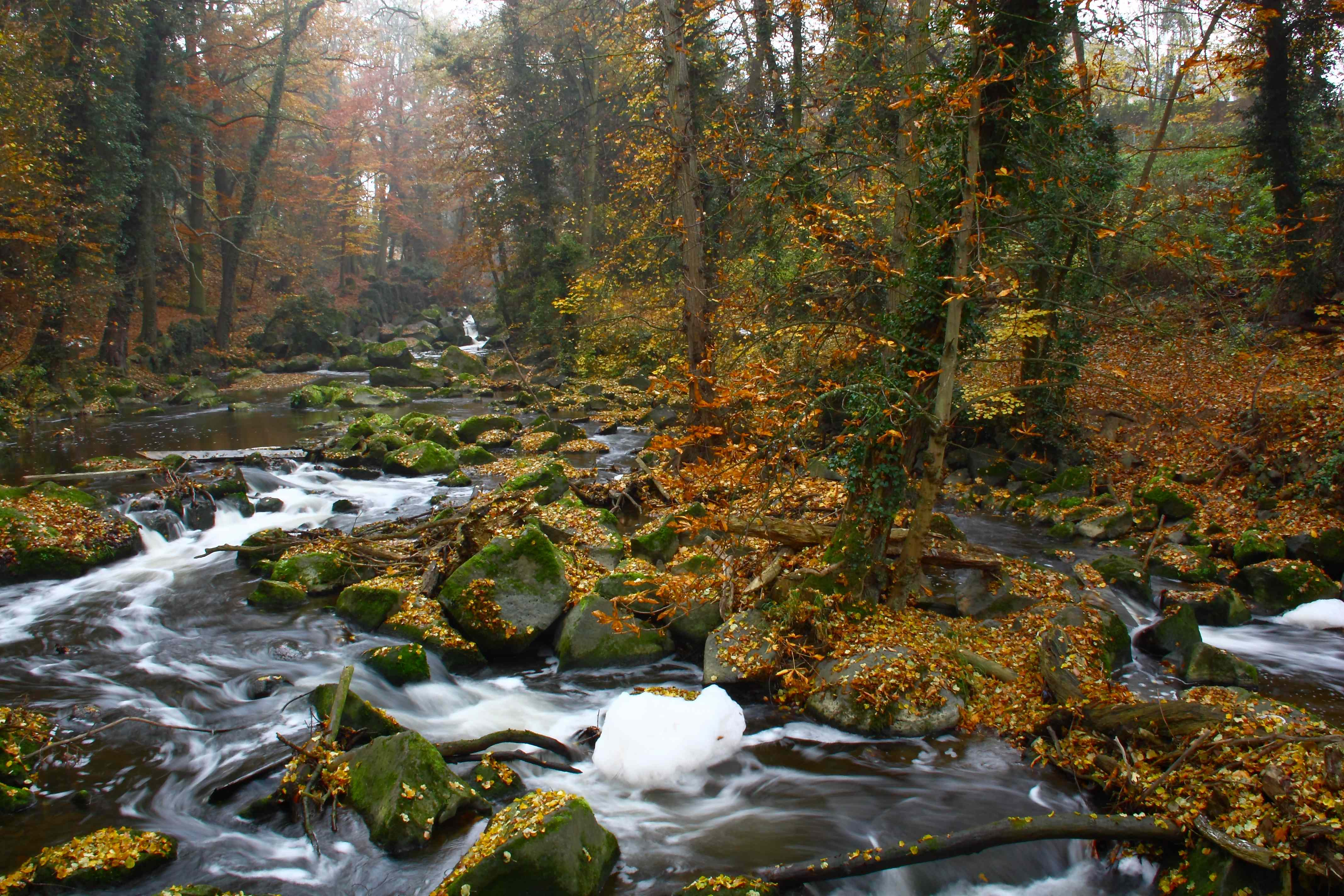 Der Rauscherpark bei Plaidt im Herbst. Fluss: Nette